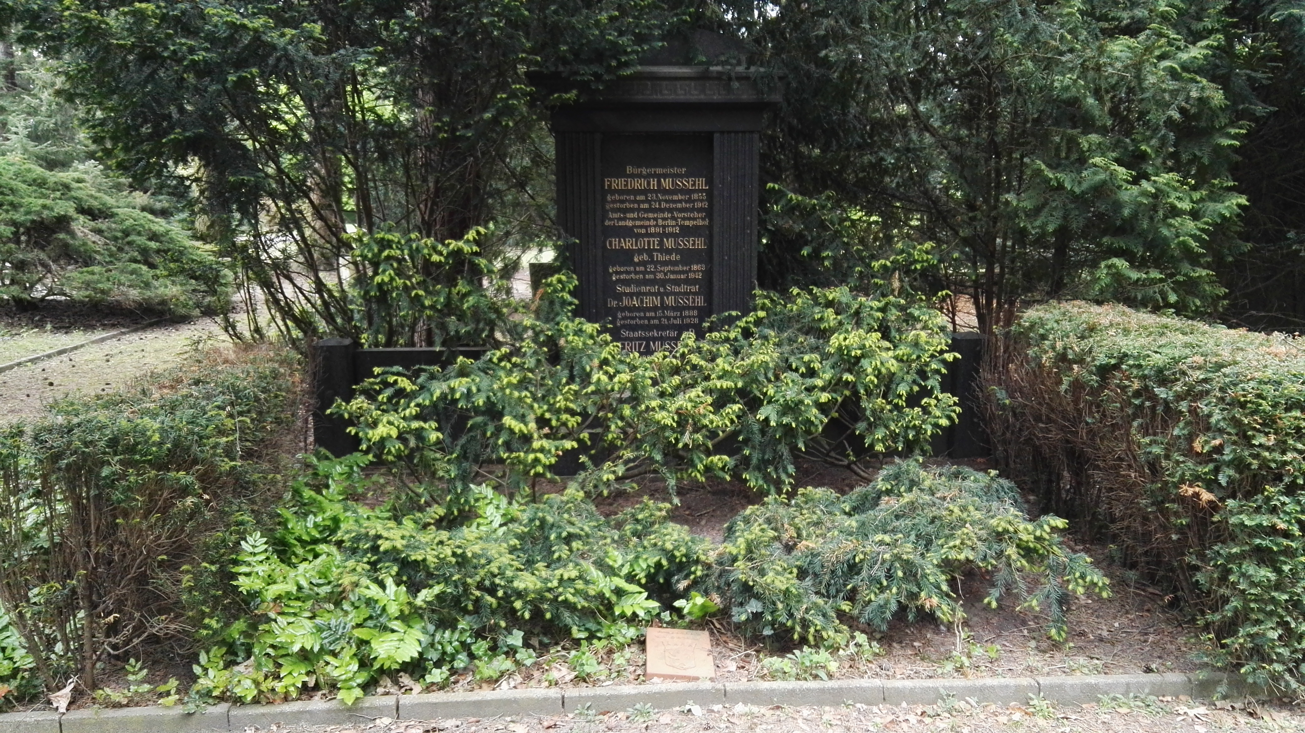 Grab von Fritz Mussehl und Friedrich Mussehl auf dem Tempelhofer Parkfriedhof in Berlin; das Grab von Friedrich Mussehl ist ein Ehrengrab